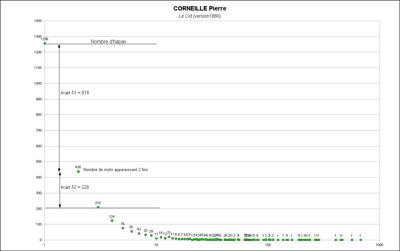 Courbe de fréquence de vocabulaire du Cid de Corneille (Pierre) - Auteur Paul FIEVRE